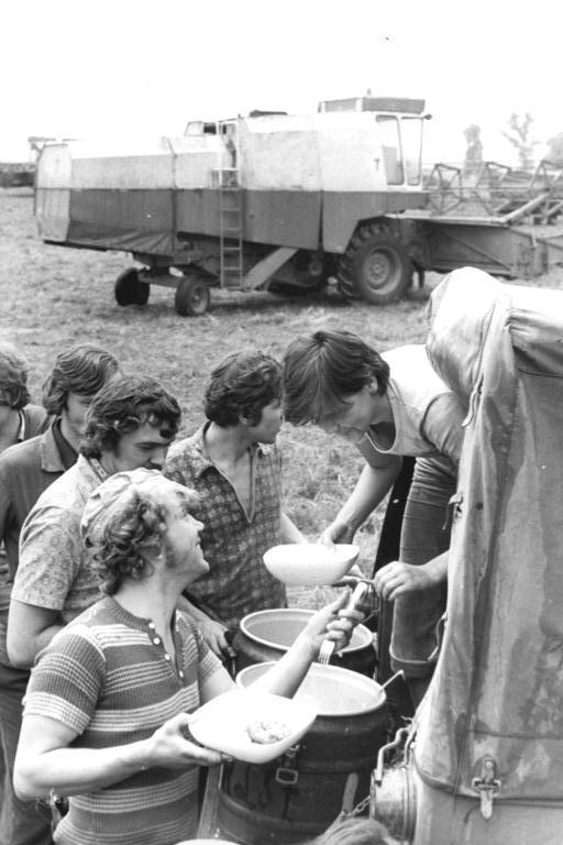 FDJ Studenten als Erntehelfer, Pause ADN-ZB Raphael 17.8.1978 .. für die FDJ-Studenten der Zentralen Erntetechnik. 72 Studenten der Agraringenieurschule Dahlen, die in der Jugendbrigade "Georg Schumann" zusammenarbeiten, helfen gegenwärtig als Mähdrescherfahrer, Verlustprüfer, Schichtleiter und Tankwarte auf den Feldern verschiedener landwirtschaftlicher Einrichtungen im Bezirk Leipzig.